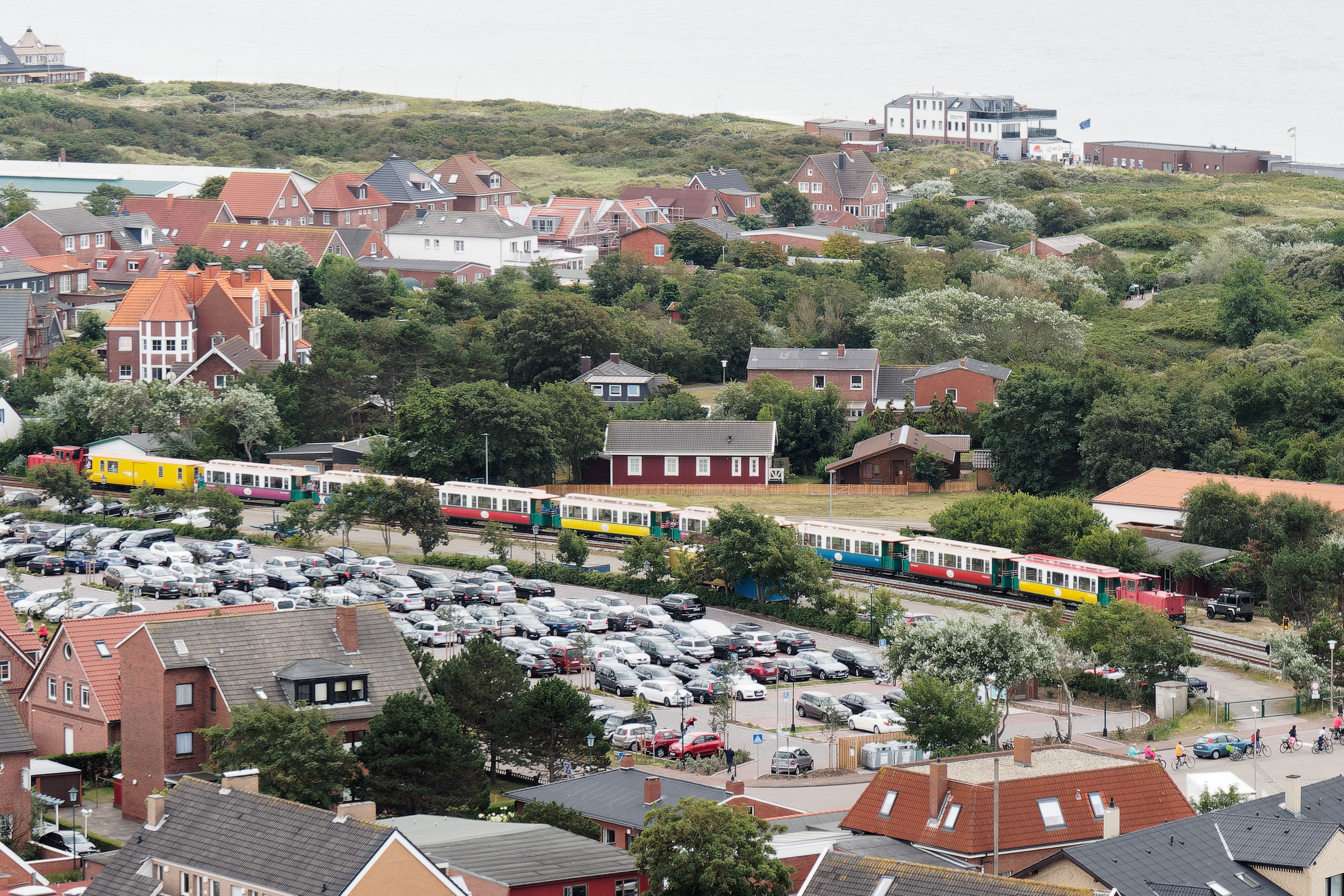 Zug der Inselbahn in Borkum auf dem Weg zum Hafen, fotografiert vom Neuen Leuchtturm. Am Inselrand das langgestreckte Gebäude des Aquariums